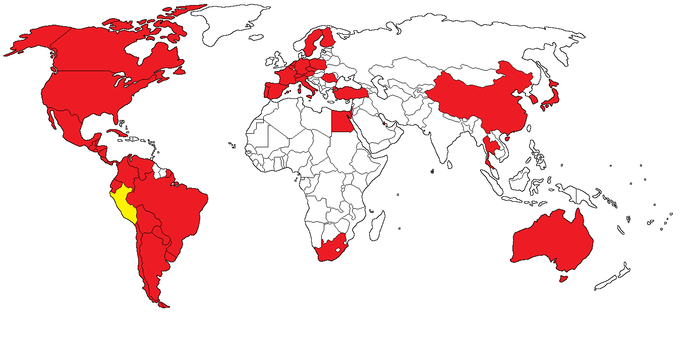 Países en donde sus habitantes donaron dinero para contrarrestar las consecuencias del Niño costero (2016-2017)